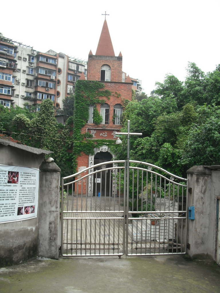 中文（中国大陆）: 重庆北碚区龙凤镇耶稣圣心堂。